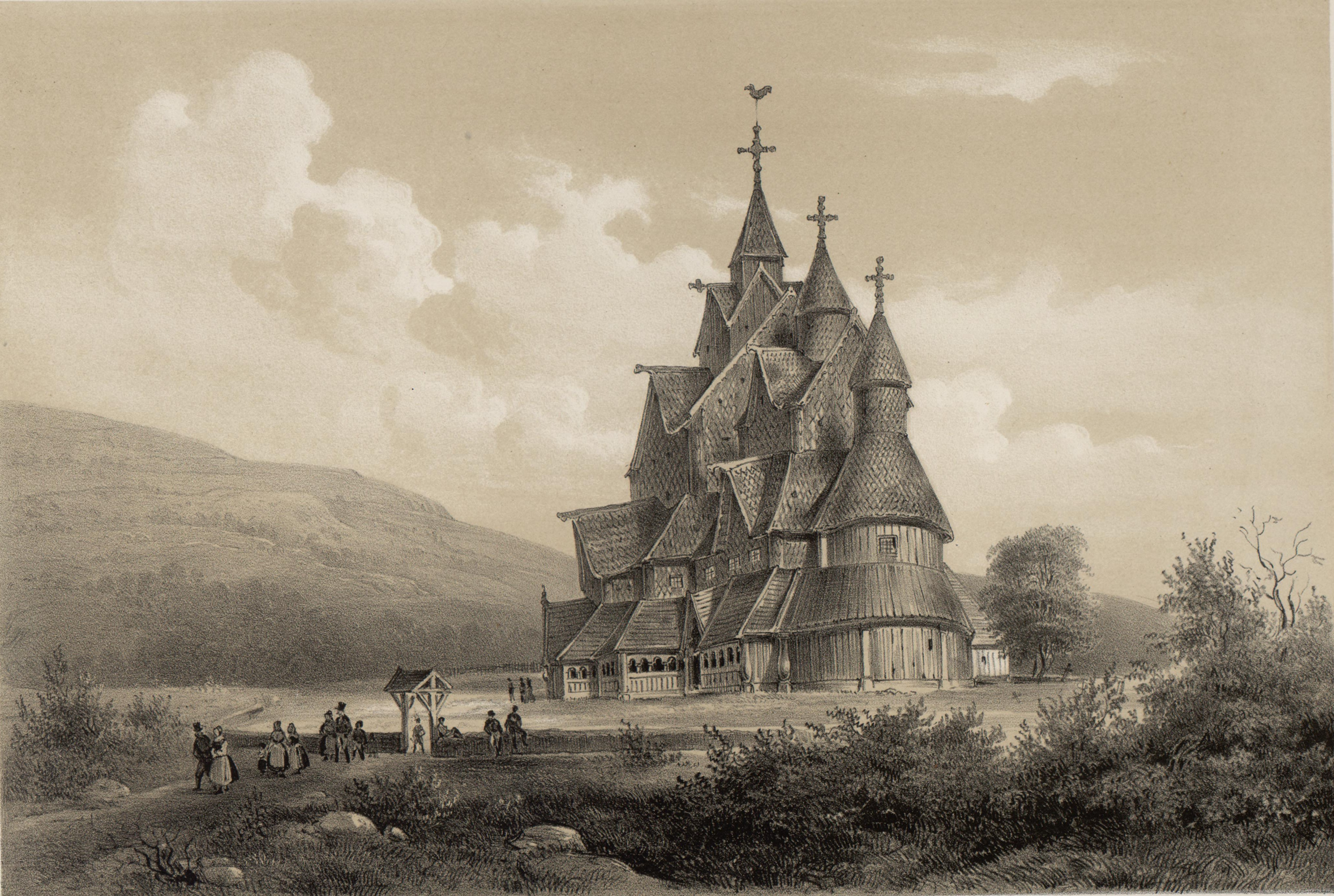 Heddal stavkirke. Illustrasjon hentet fra boken "Norge fremstillet i Tegninger" av Asbjørnsen, P.Chr. og utgitt av Chr. Tønsberg (no, 1848)